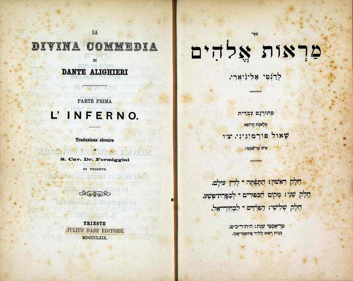 Saul Formigginis Übersetzung des Infernos aus der Divina Commedia